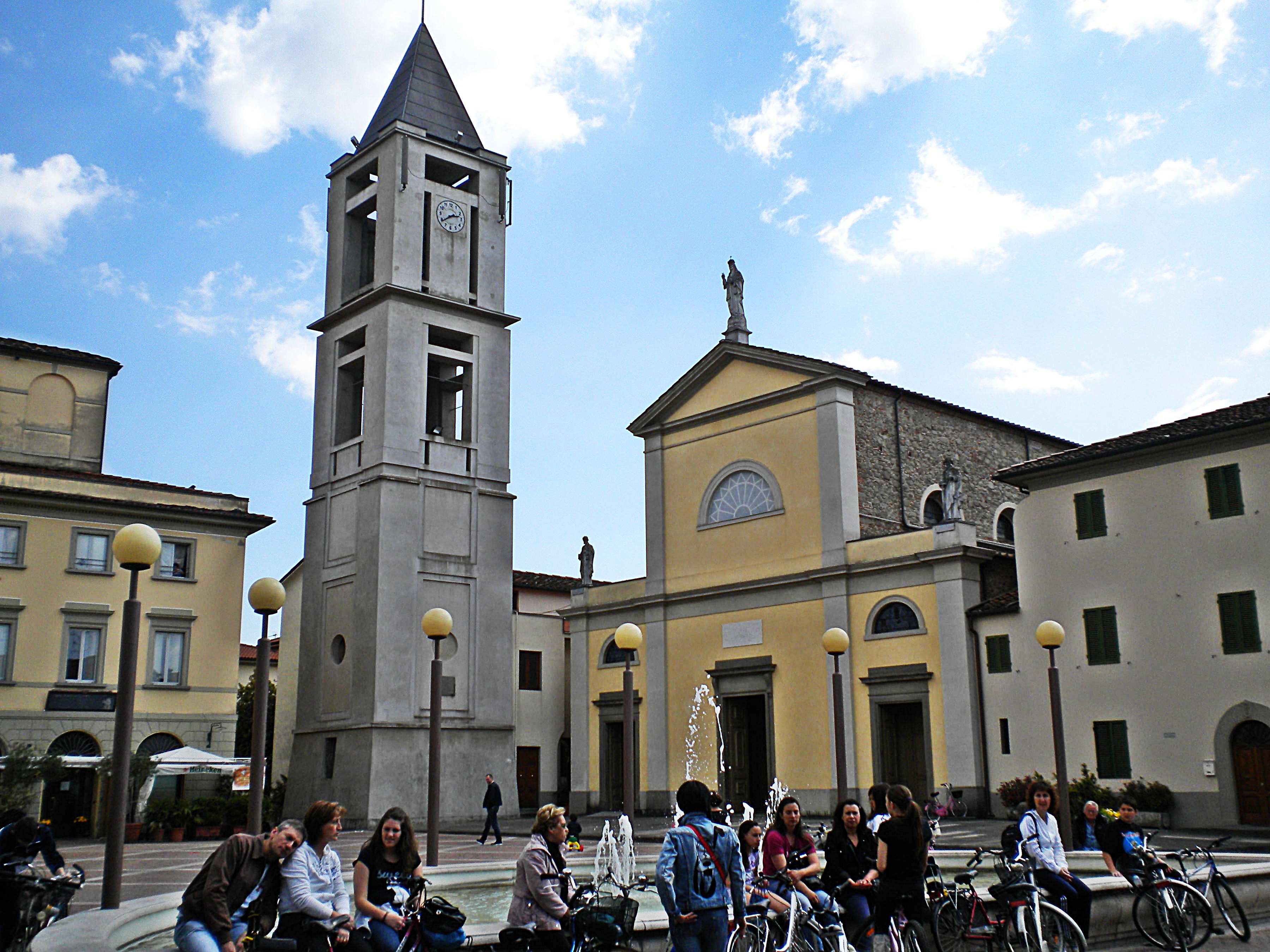 San Pietro